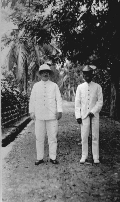 Foto. Gouverneur van Sandick met de Sultan van Batjan